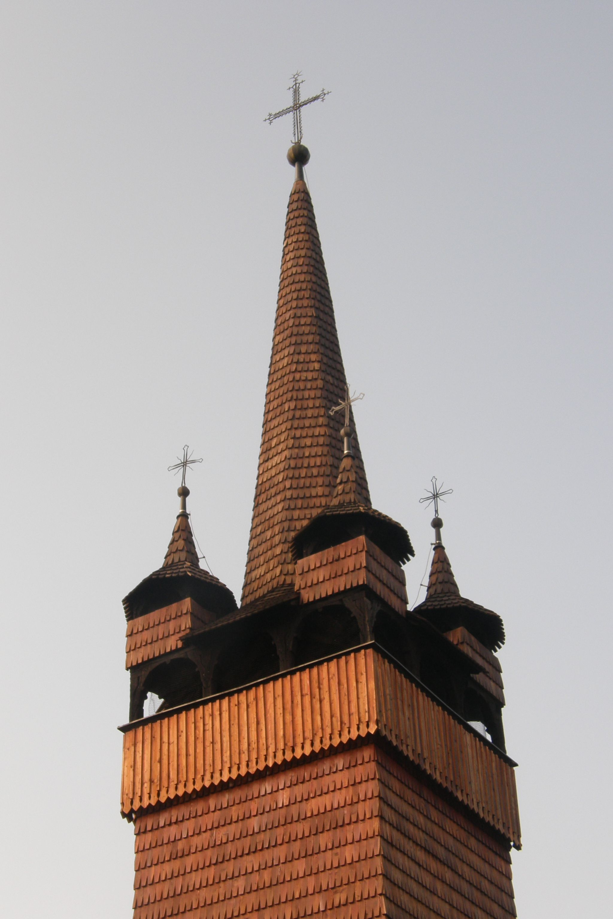 Kostel Církve československé husitské (Blansko), Rodkovského 1140/7, Blansko